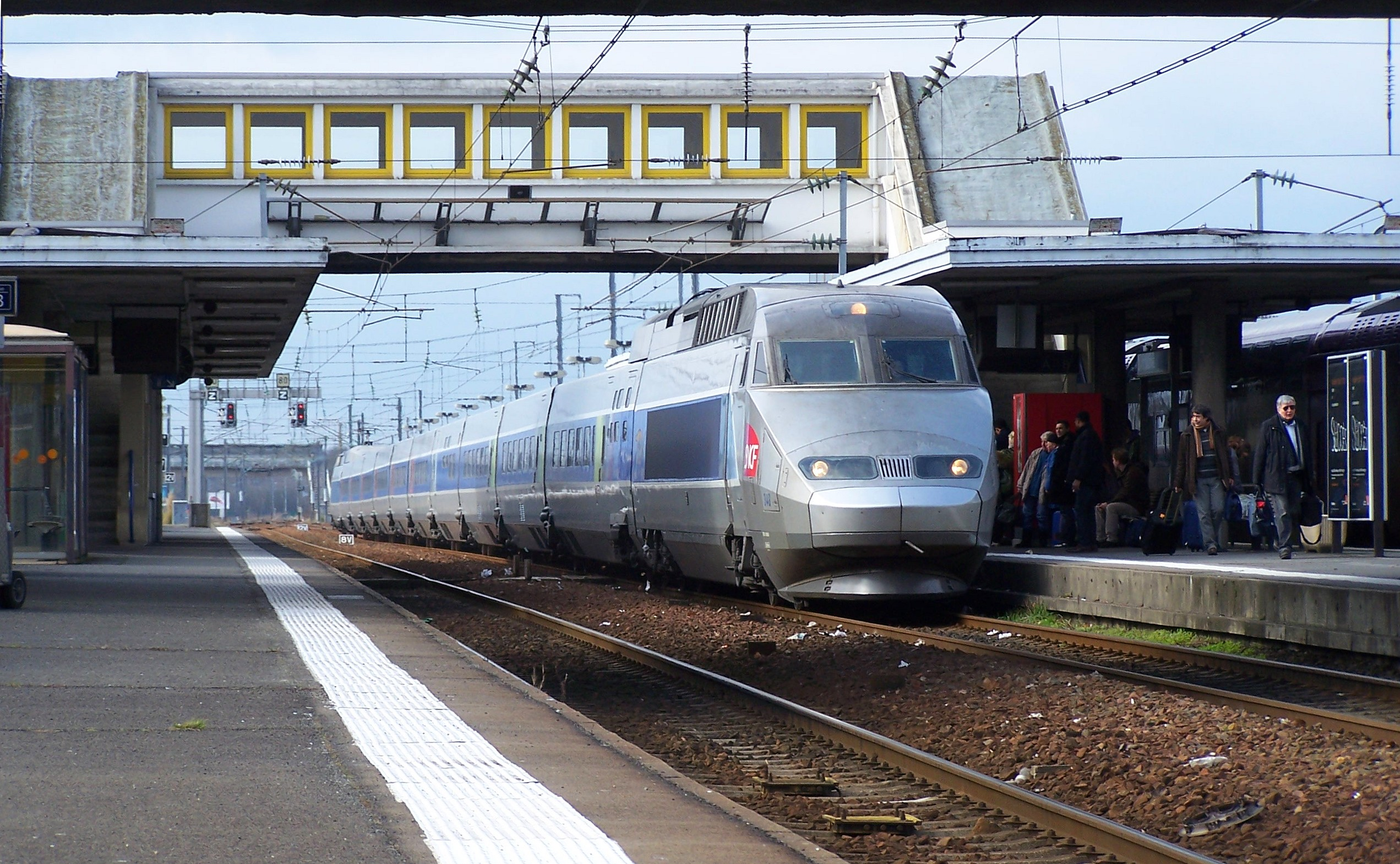 Le TGV Le Croisic-Paris Montparnasse, en provenance du Croizic, entre en gare de St Nazaire